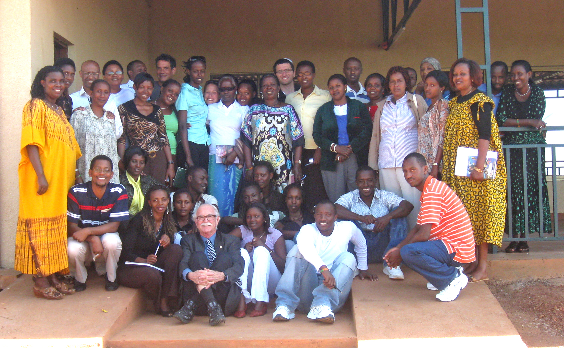 ד"ר חיים פרי בכפר הנוער אגהזו-שלום שהוקם לניצולי הג'נוסייד ברואנדה על פי שיטת 'דרך כפר